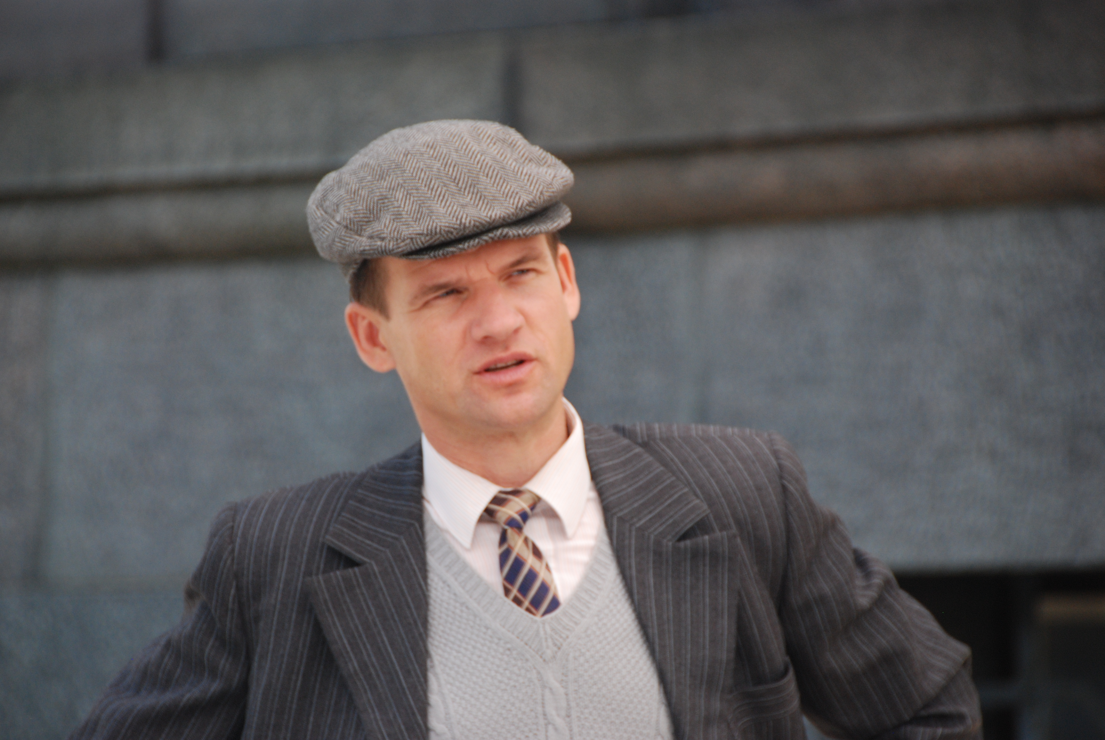 Filmas "Sapņu komanda 1935" epizodes filmēšana pie Ministru kabineta ēkas